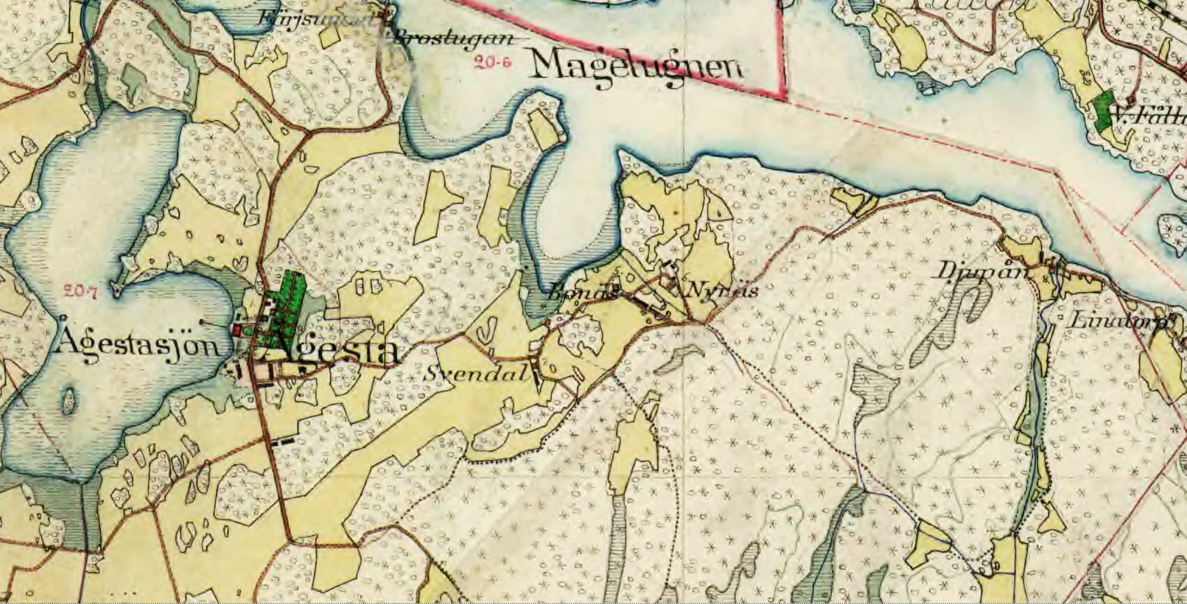 Ågesta gård med torpen Svendal, Bonäs, Nynäs, Djupån och Linatorp